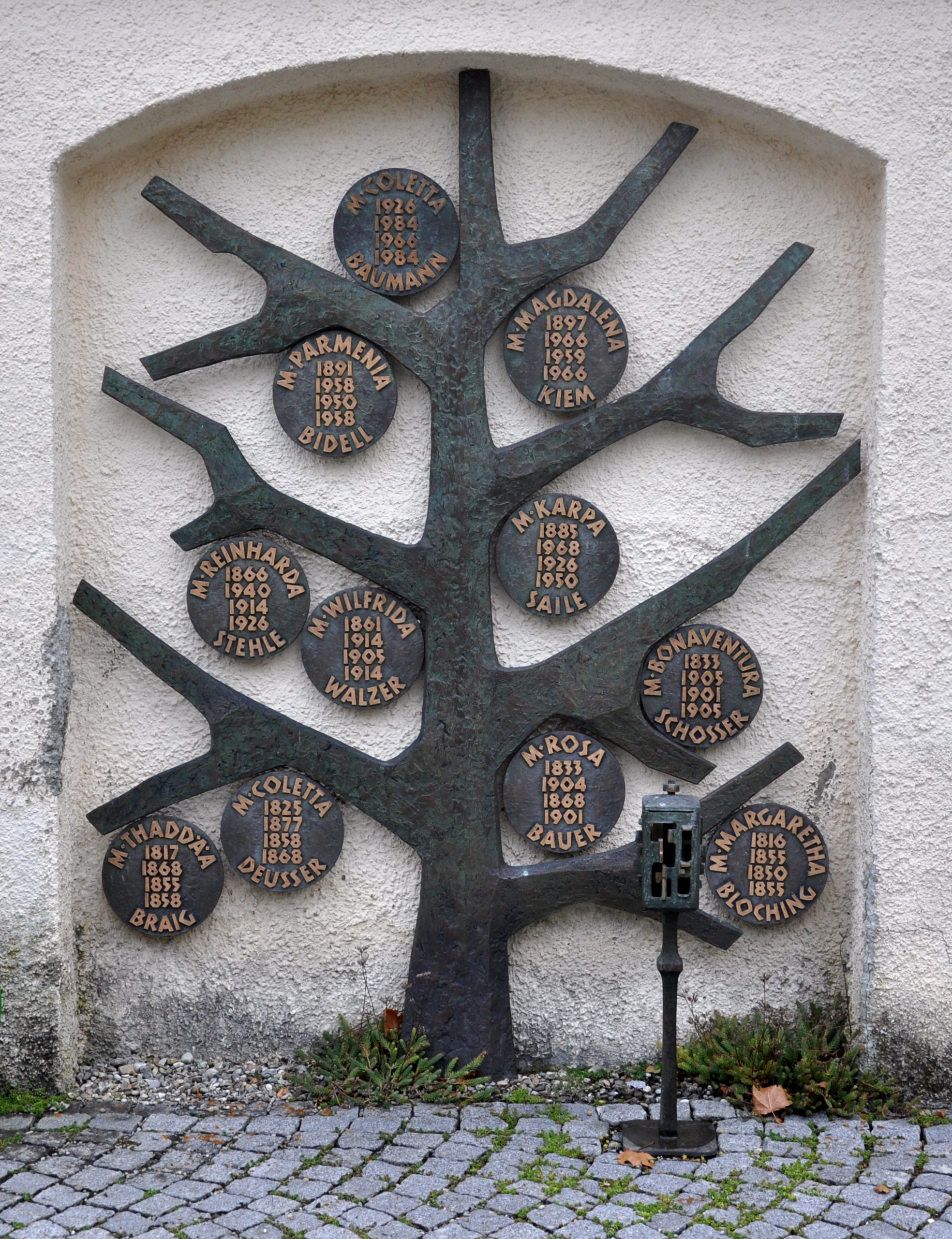 Bad Waldsee, Kloster Reute, Klosterfriedhof, Denkmal für die Oberinnen